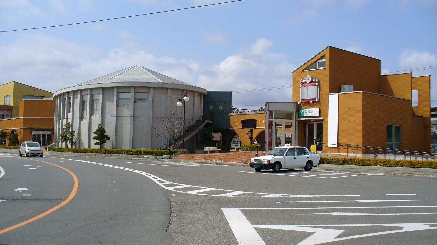 常磐線双葉駅